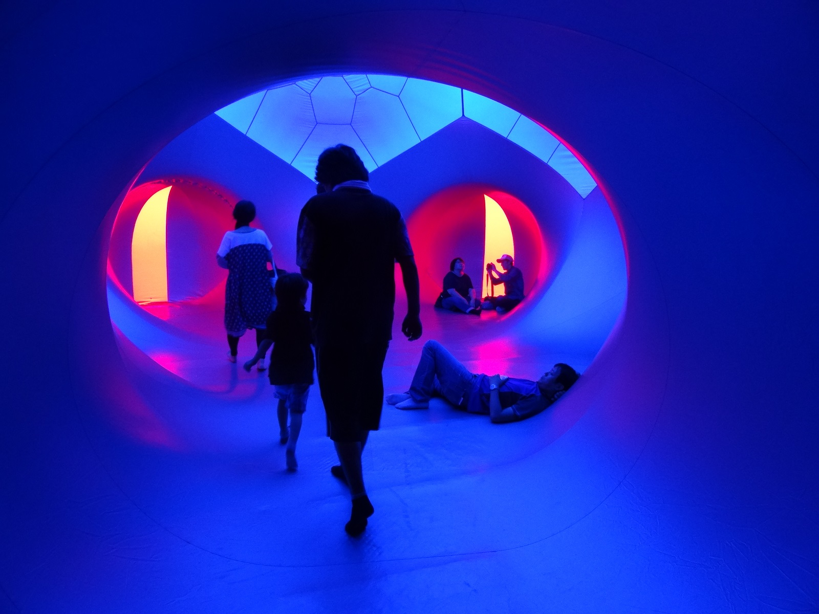 あいちトリンエナーレ2016（岡崎公園、ペンタルム・ルミナリウム）